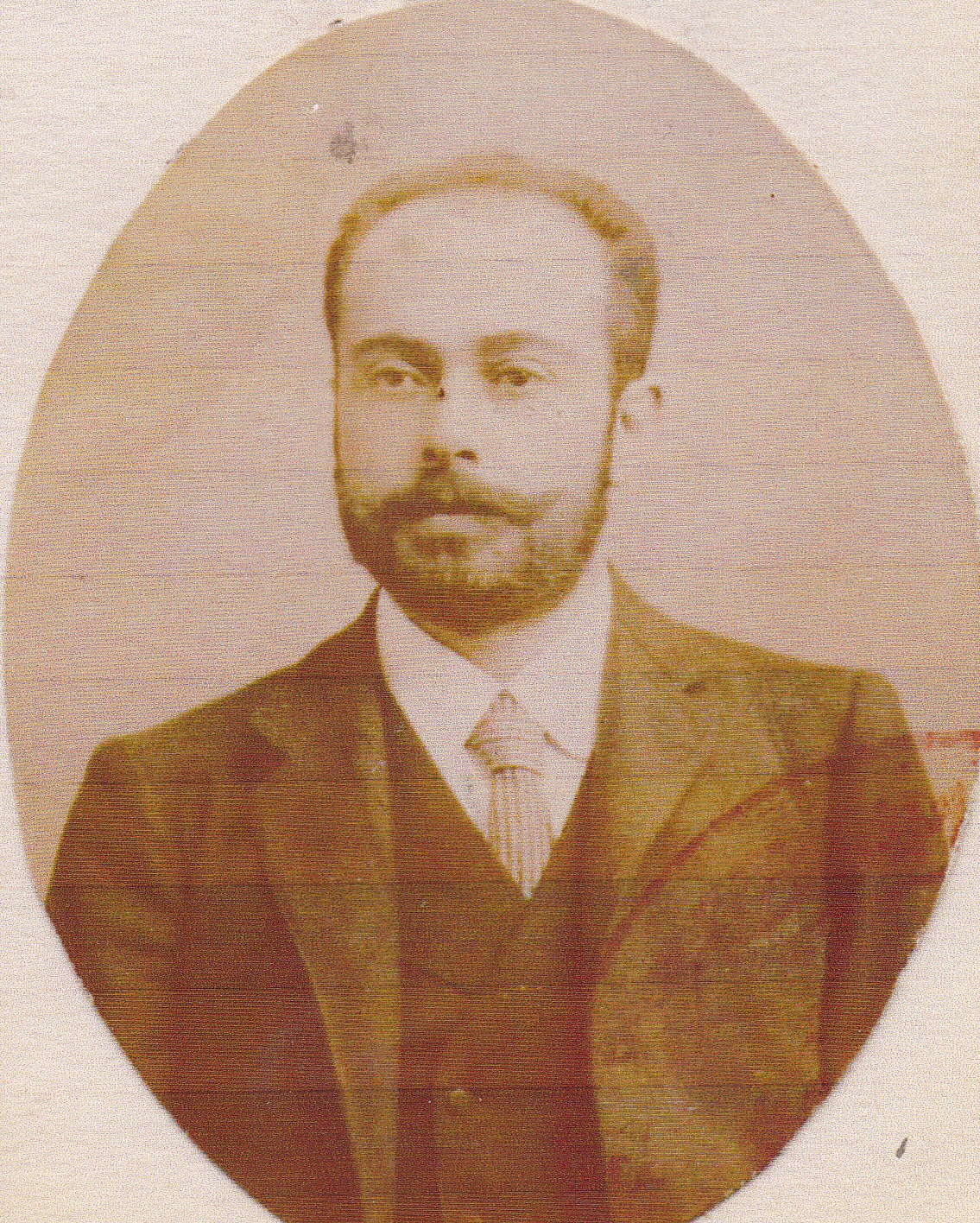 Fotografía de 1890 en Santiago de Chile, Fallecío en 1899. Retrato que se encuentra en álbum Familiar. Luis Vargas Solar es hijo de Francisco Vargas Fontecilla y fue casado con Clarisa Bello Guzmán nieta de Andrés Bello. Ella es nieta de Andrés Bello Lopez.